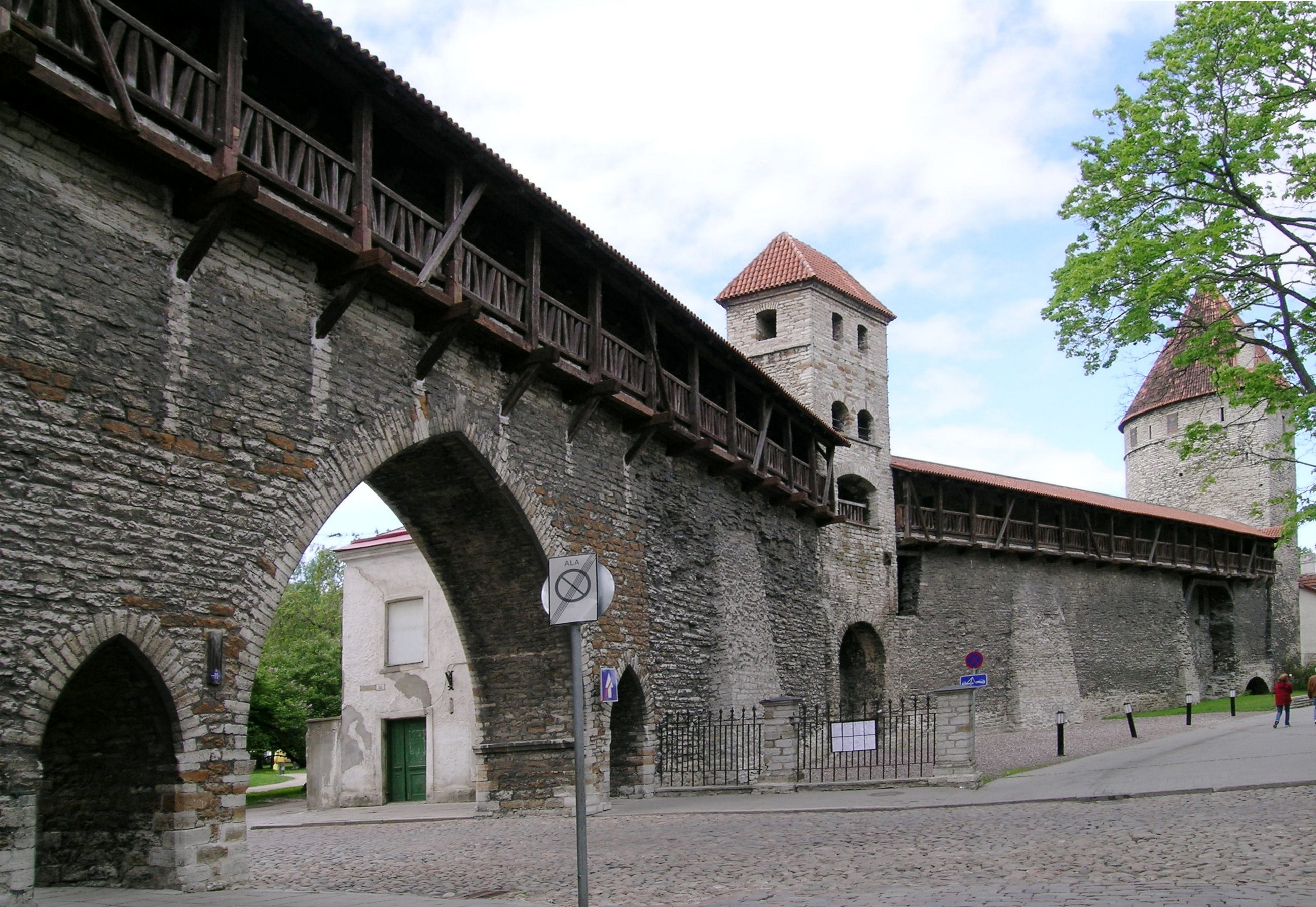 Teil der Stadtmauer von Tallin